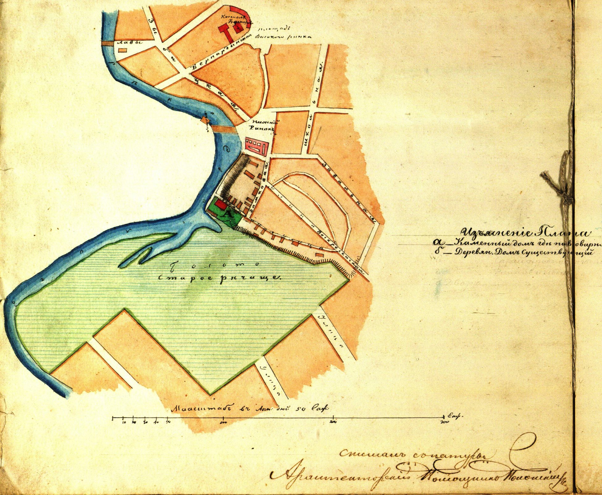 Беларуская (тарашкевіца): Менск (Miensk), Лавы (Łavy), Нізкі Рынак (Nizki Rynak) і Замчышча (Zamčyšča). Плян